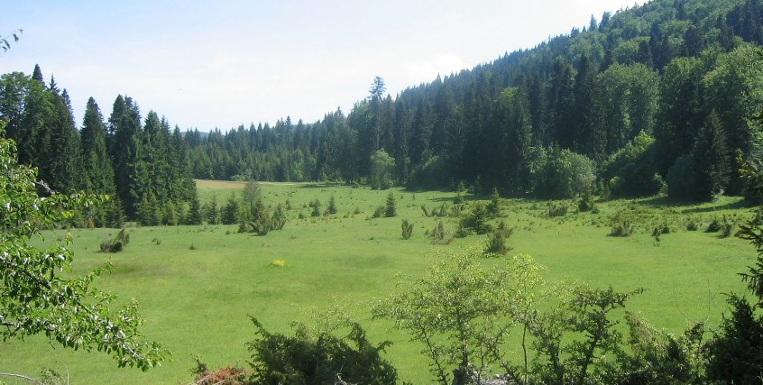 Село Рача